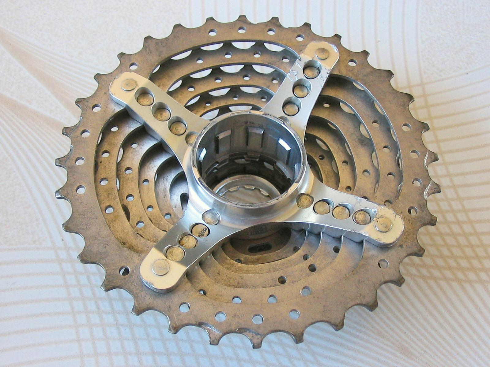 Shimano XTR cassette aluminium spider